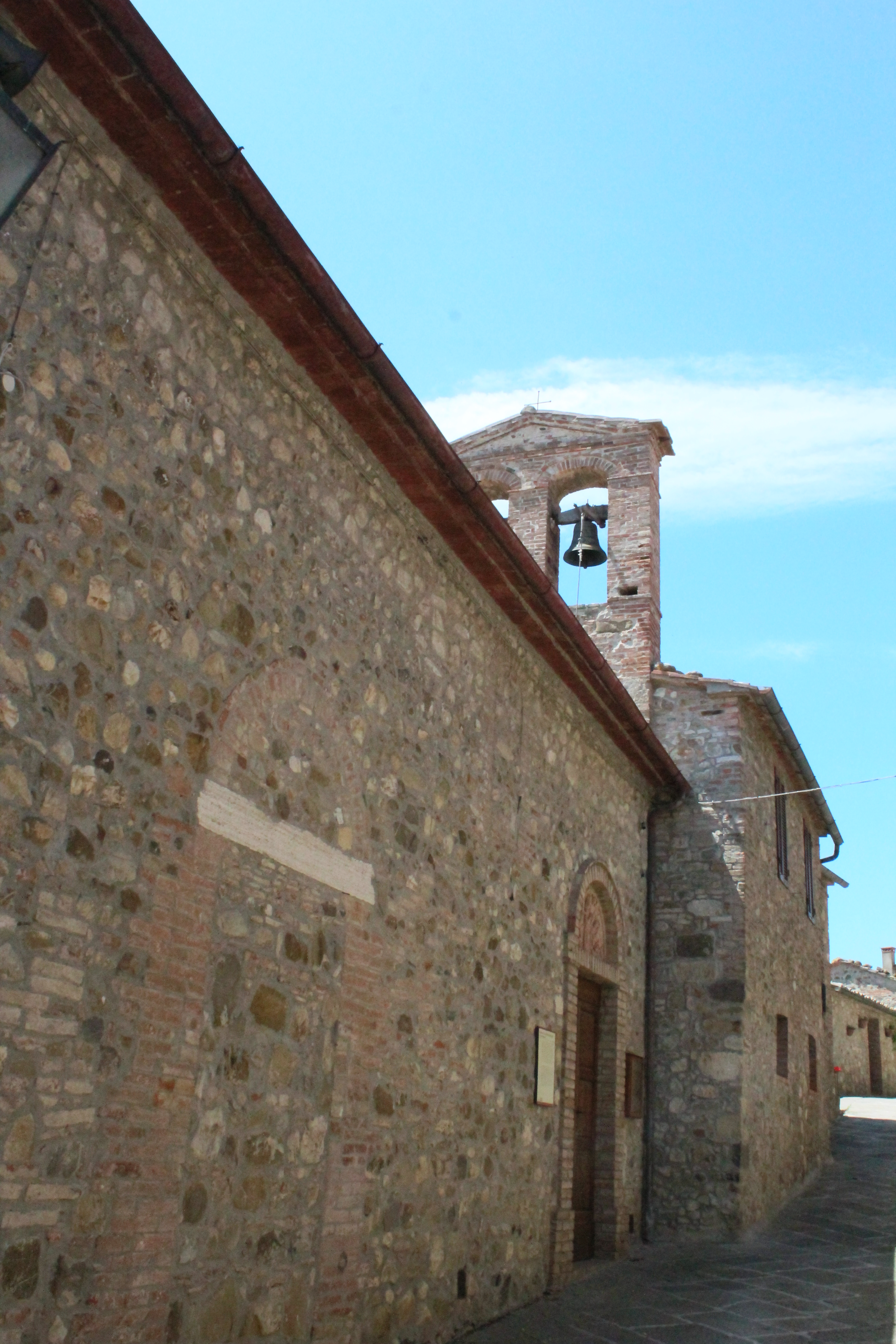 Church Santa Maria Assunta in Contignano, hamlet of Radicofani, Val d’Orcia, Province of Siena, Tuscany, Italy